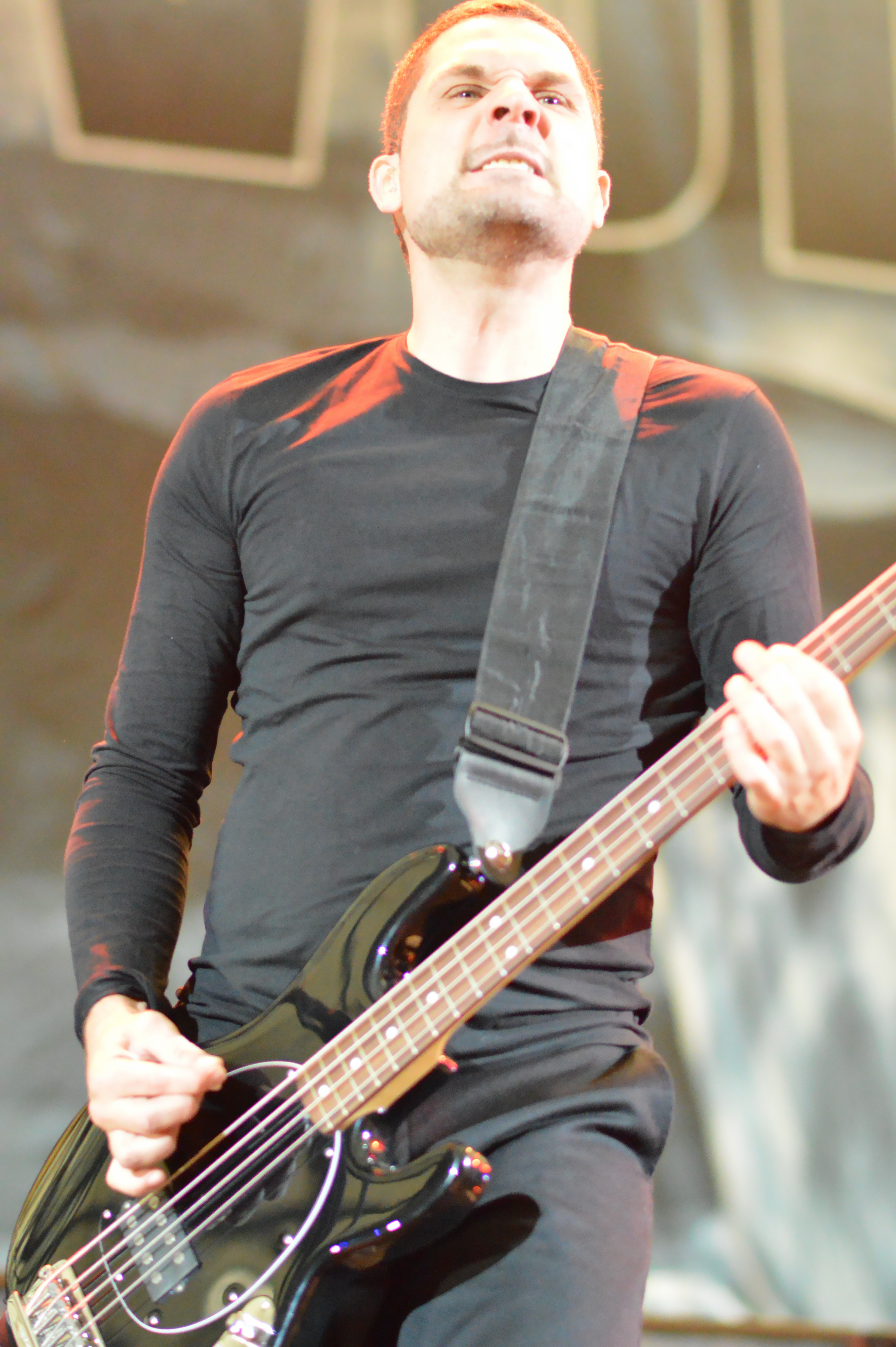 Volbeat bei Rock im Pott 2013